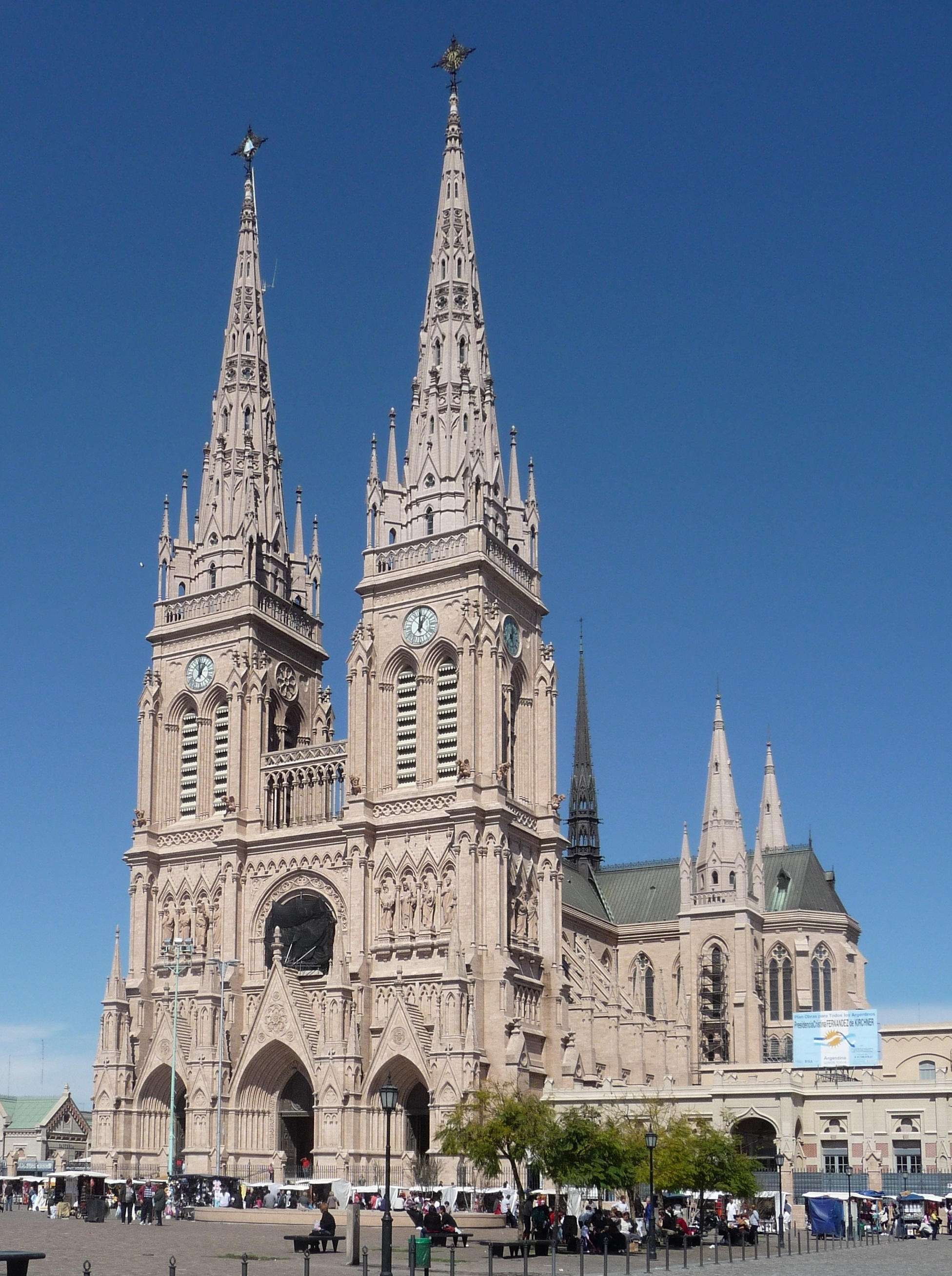 Marienbasilika von Luján, Argentinien